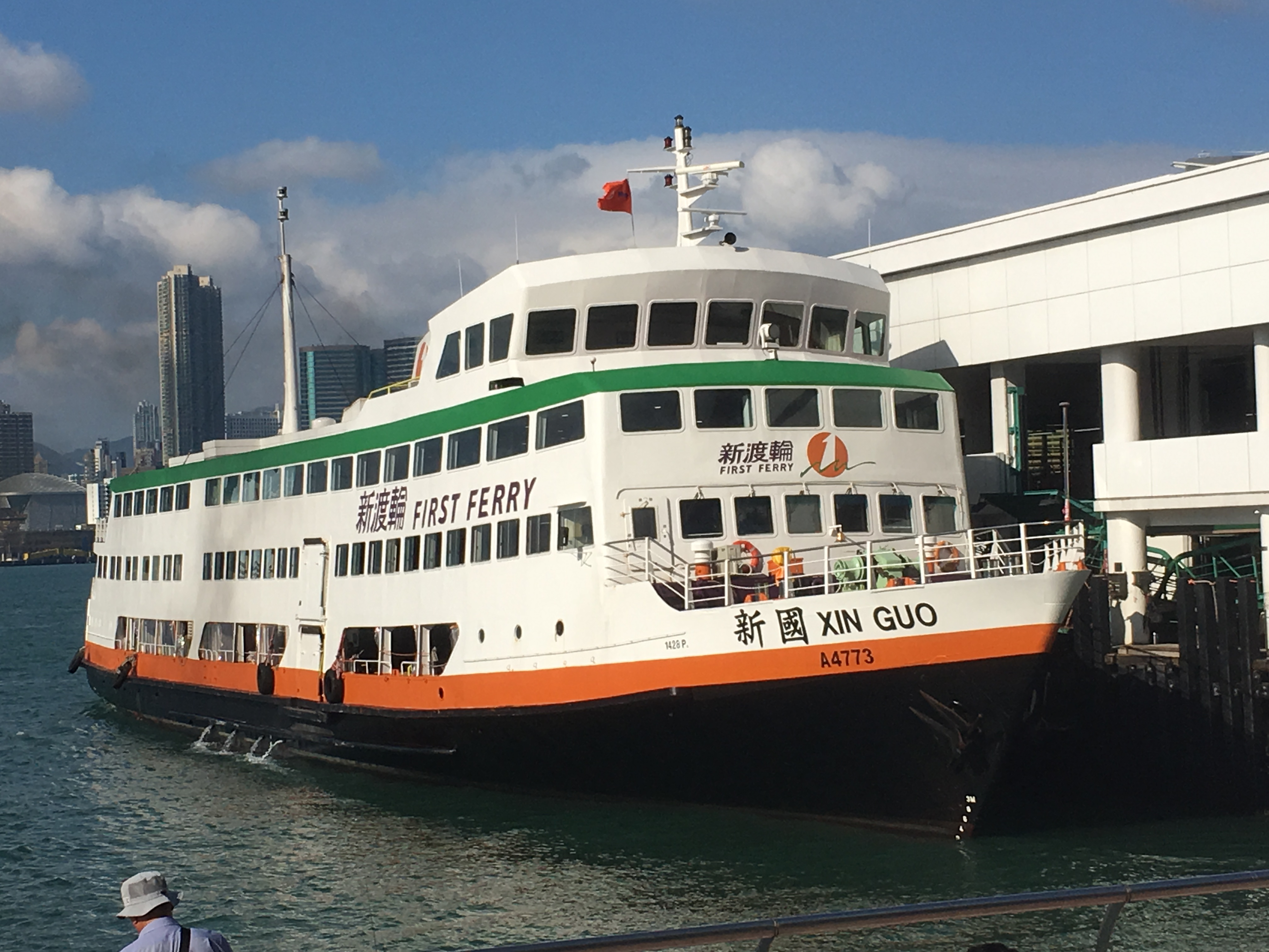 This photo is taken in Central Ferry Pier.